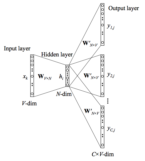 modéle du reseau de neuronnes skip-gram